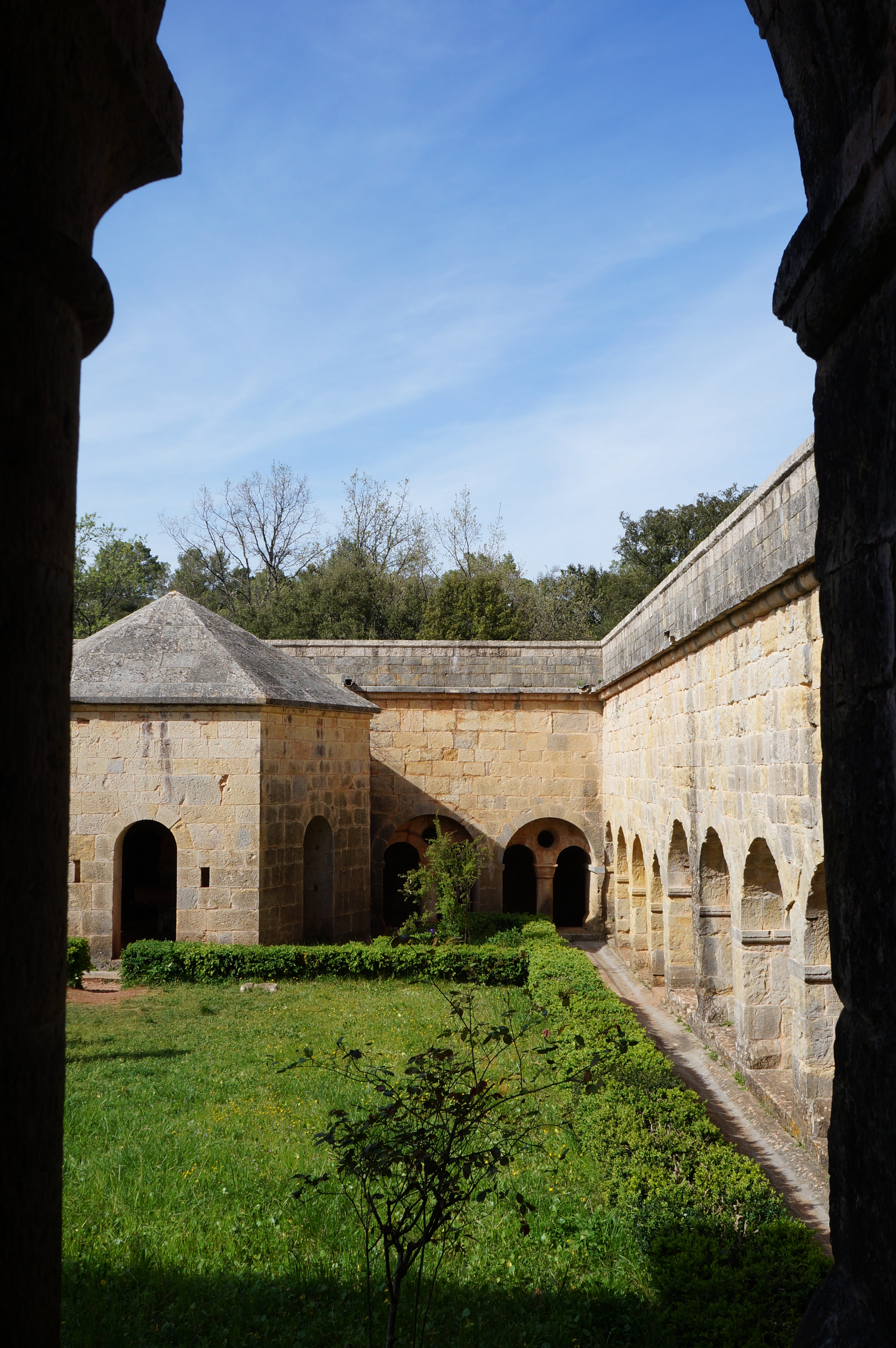 Blick in den Innenhof des Klosters Thoronet